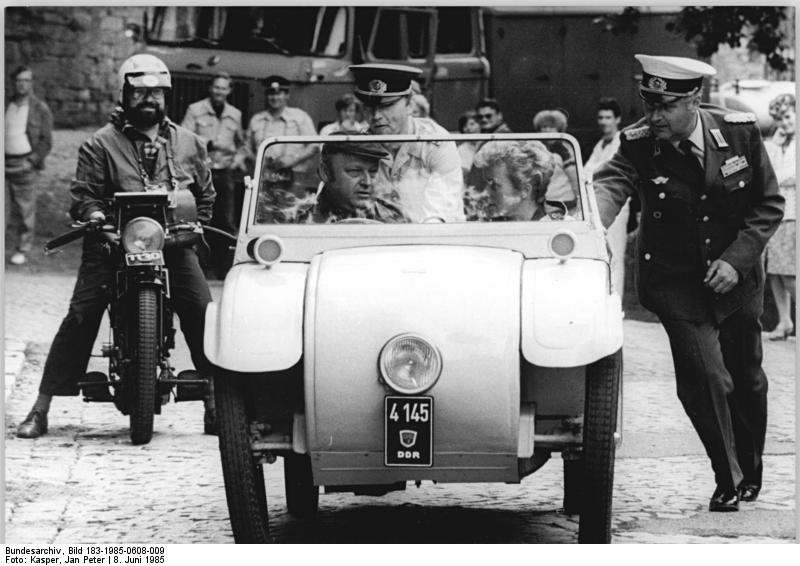 Gera, Oldtimer-Rallye ADN-ZB Kasper 8.3.85-Gera: Veteranen-Ralley - Startschwierigkeiten hatte dieser Hanomag 2/10, Baujahr 1926. Zwei Offiziere der Verkehrspolizei halfen ihm auf die "Sprünge".